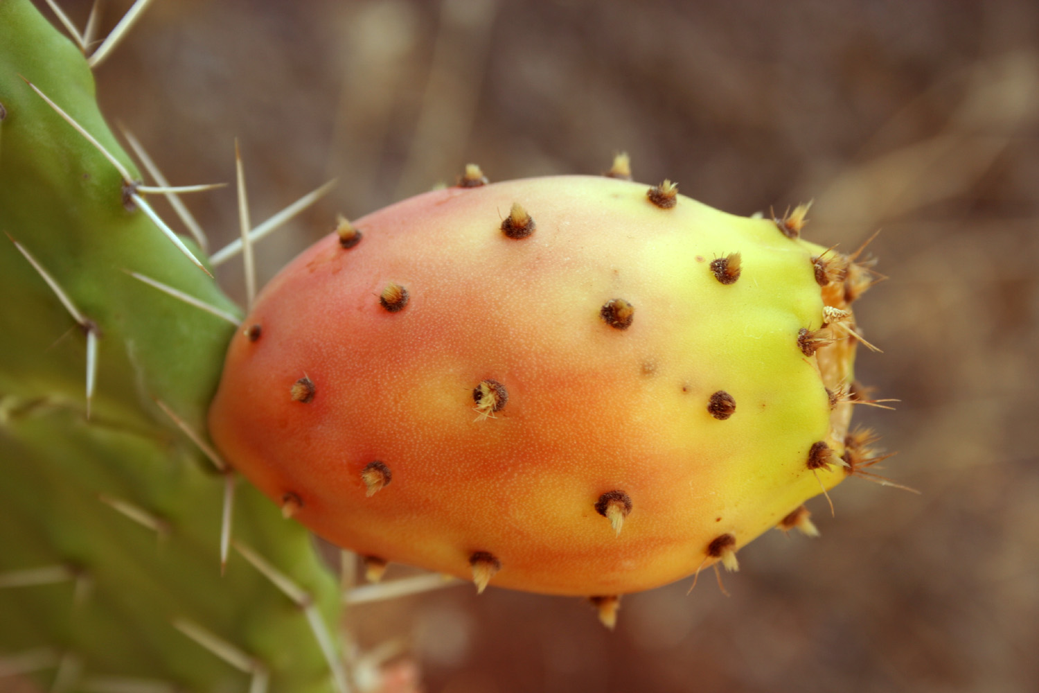 Photo by Seweryn Olkowicz Nauplio, Greece